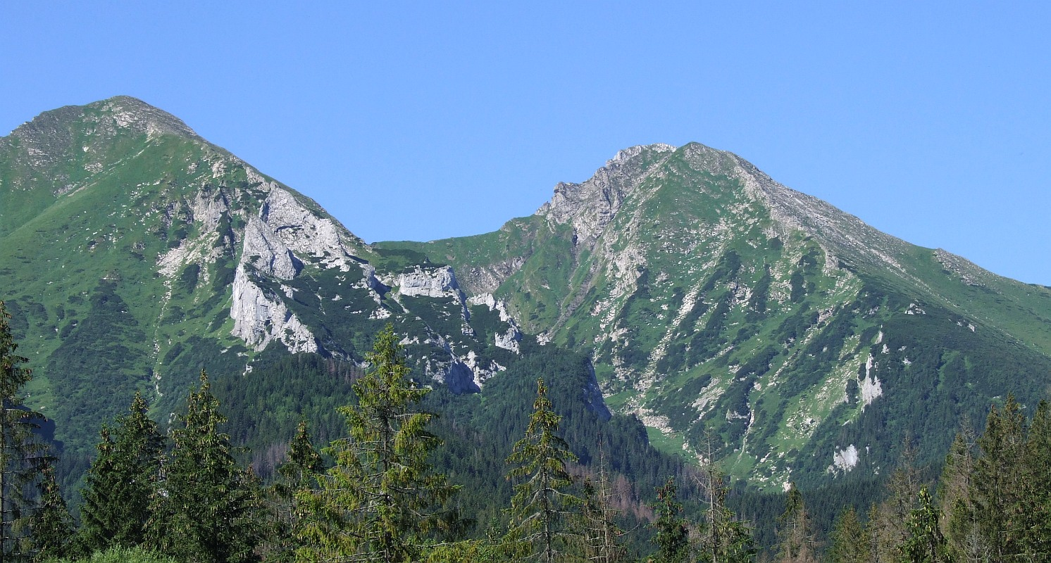 Płaczliwa Skała i Hawrań, pomiędzy nimi Strzystarska Przełęczi Strzystarski Żleb. Widok ze Zdziaru